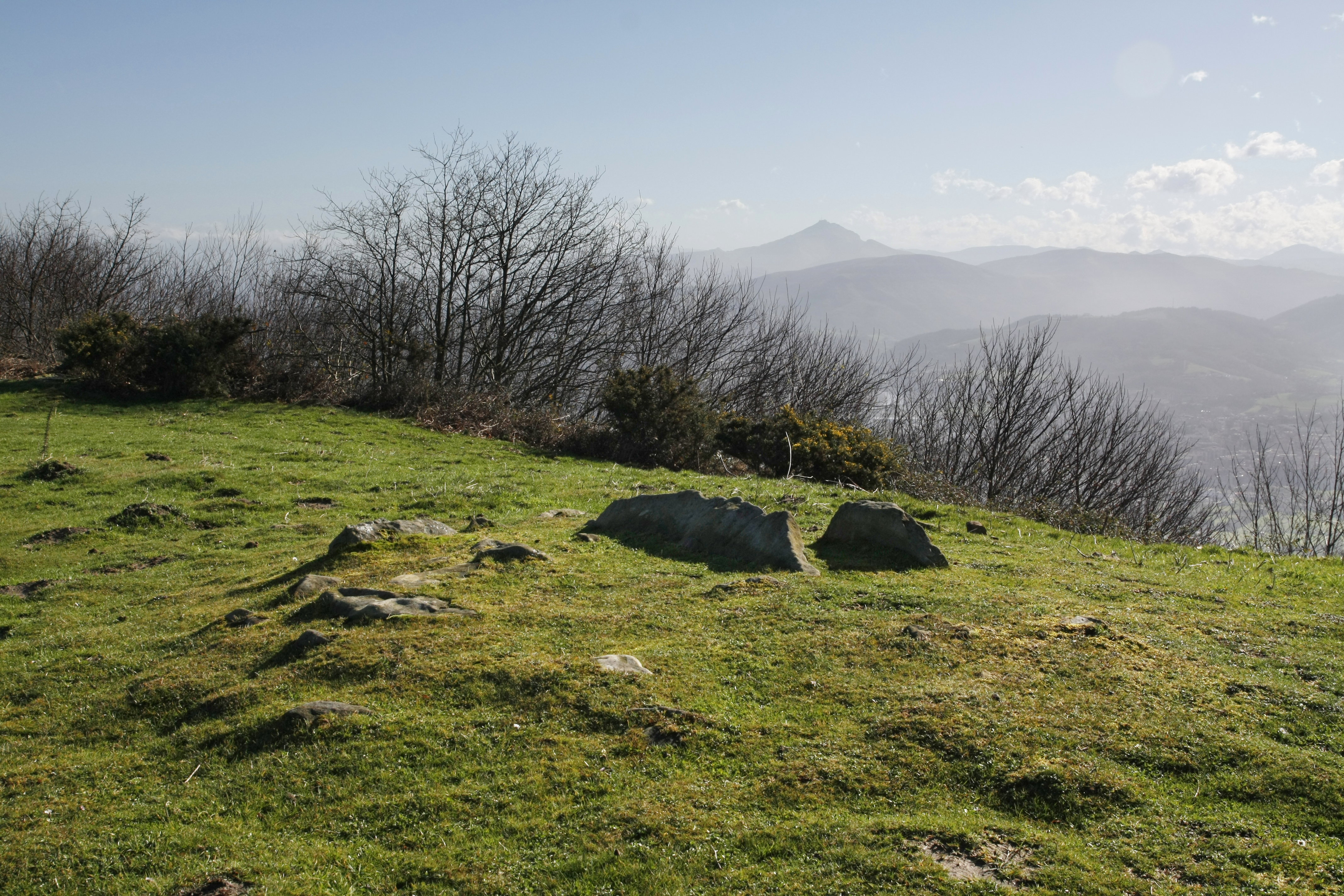 Jaizkibel IV trikuharria - Hondarribia